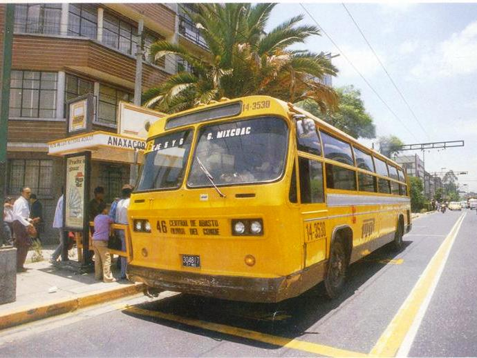 Un autobús de la extinta empresa de transporte "Ruta 100" de la Ciudad de México, con el corte de color amarillo en una unidad conocida popularmente como "Delfín", en la década de los 80.